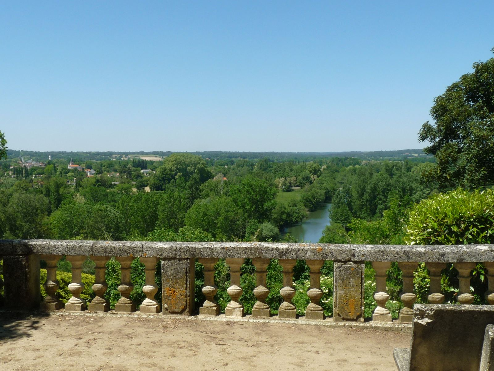 la Dronne vue de La Roche-Chalais, Dordogne, France